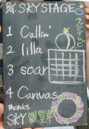 amiinAセトリボード(20170804(1))